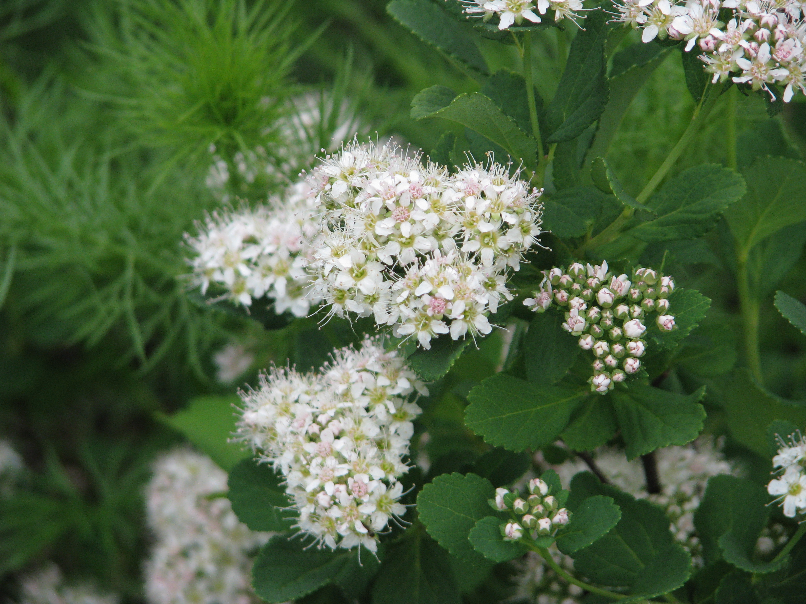 Spiraea betulifolia